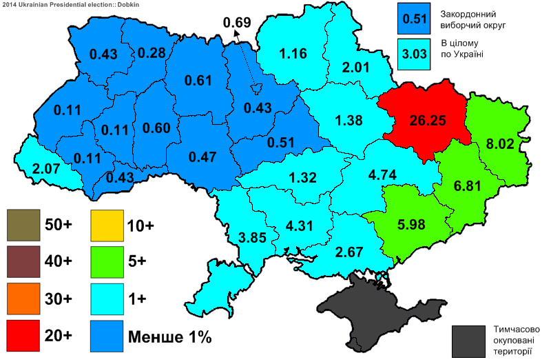 Електоральна підтримка Добкіна Михайла Марковича на виборах Президента України 2014.